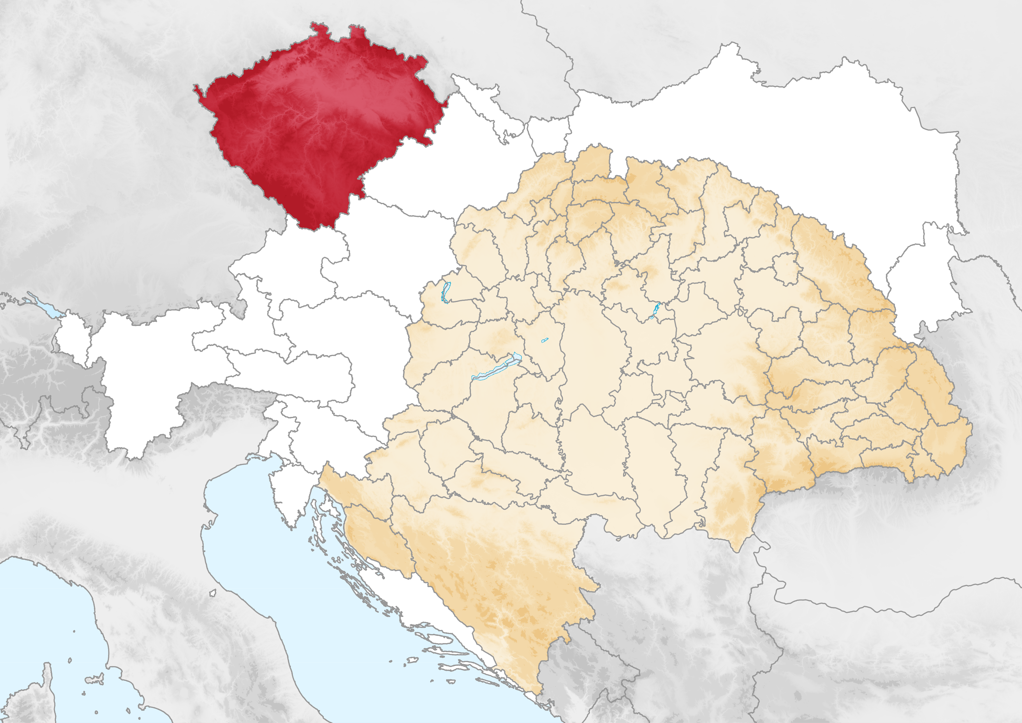 Carte de la Bohême dans l'empire d'Autriche (1914)